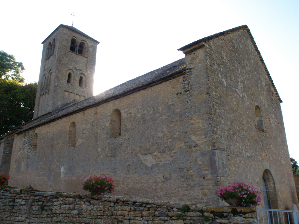 Église romane Saint-Denis (XIe siècle). Massy, Saône-et-Loire, Bourgogne (France).